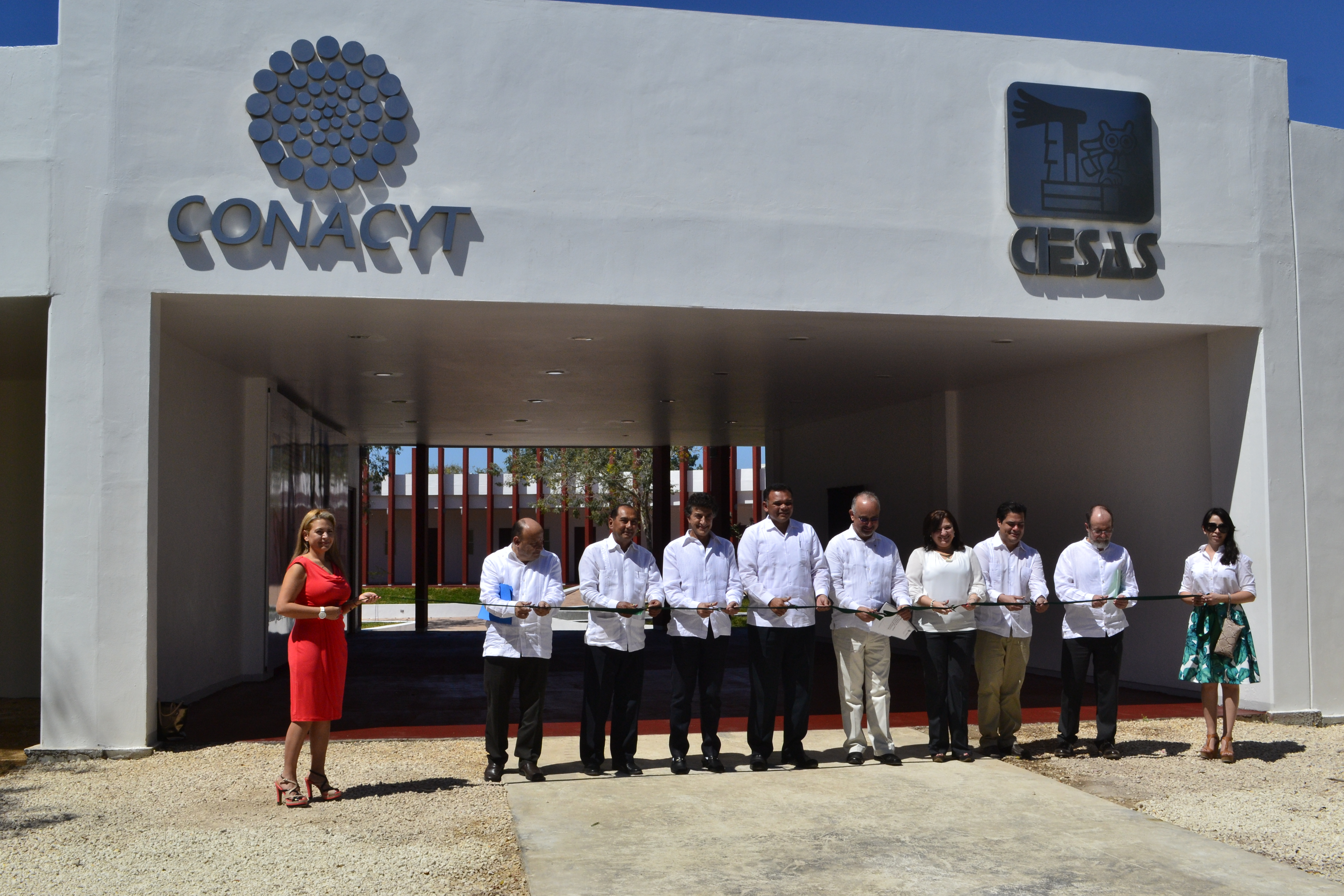 Inauguración del Centro de Investigación y Estudios Superiores en Antropología Social (CIESAS) Peninsular en el Parque Científico y Tecnológico de Yucatán.